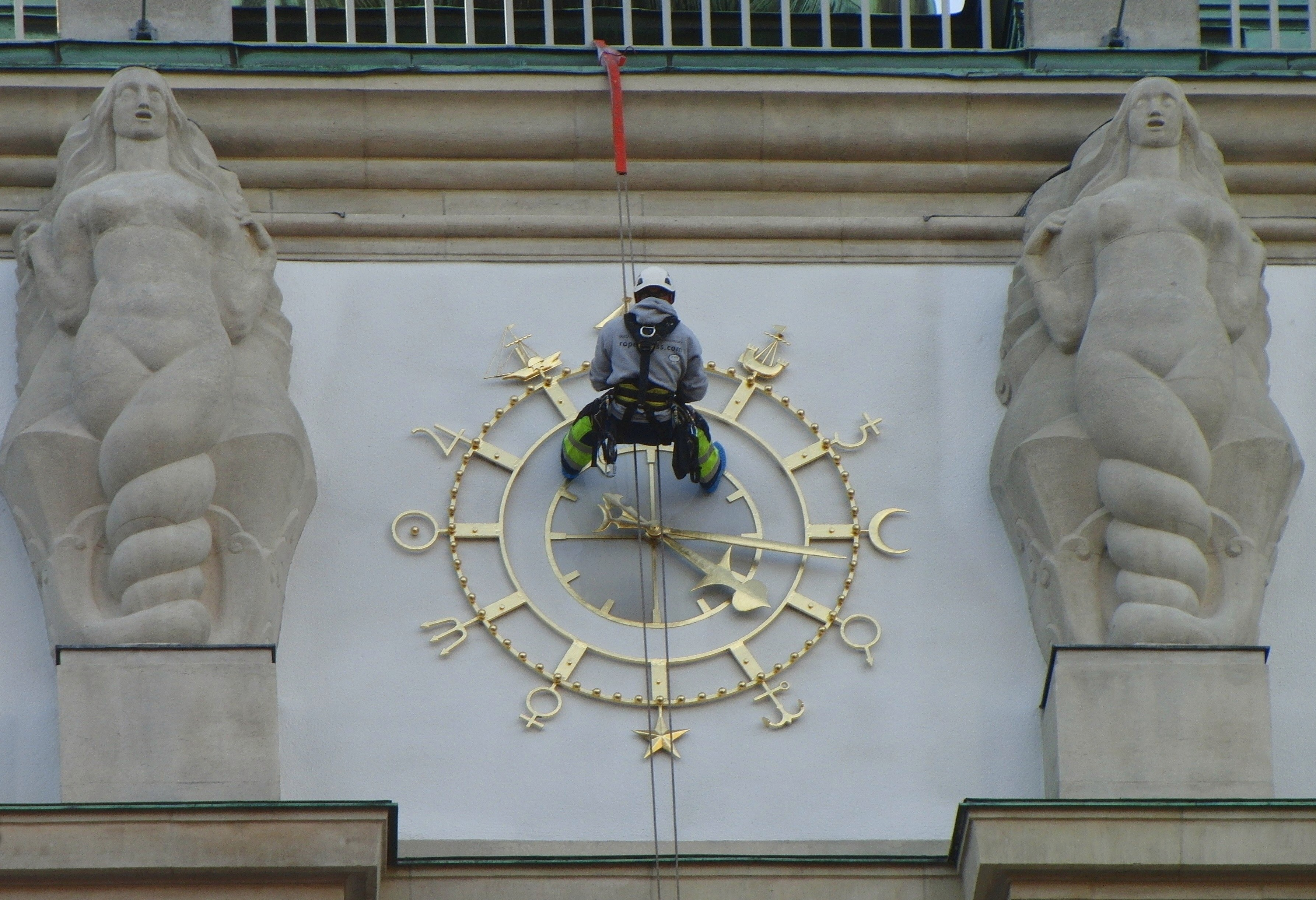 Nordstjernanhusets byggnadsur; visarna hakade i varann och måste åtgärdas.